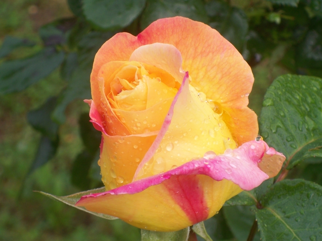 si rimane incantati quando la si guarda